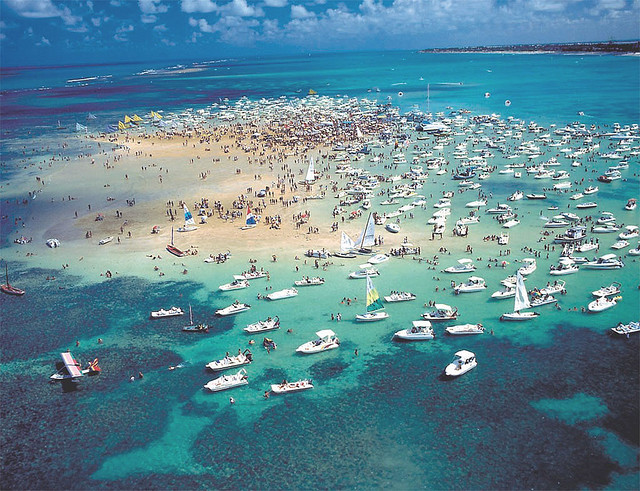 Areia Vermelha - Cabedelo - Paraíba - Brasil